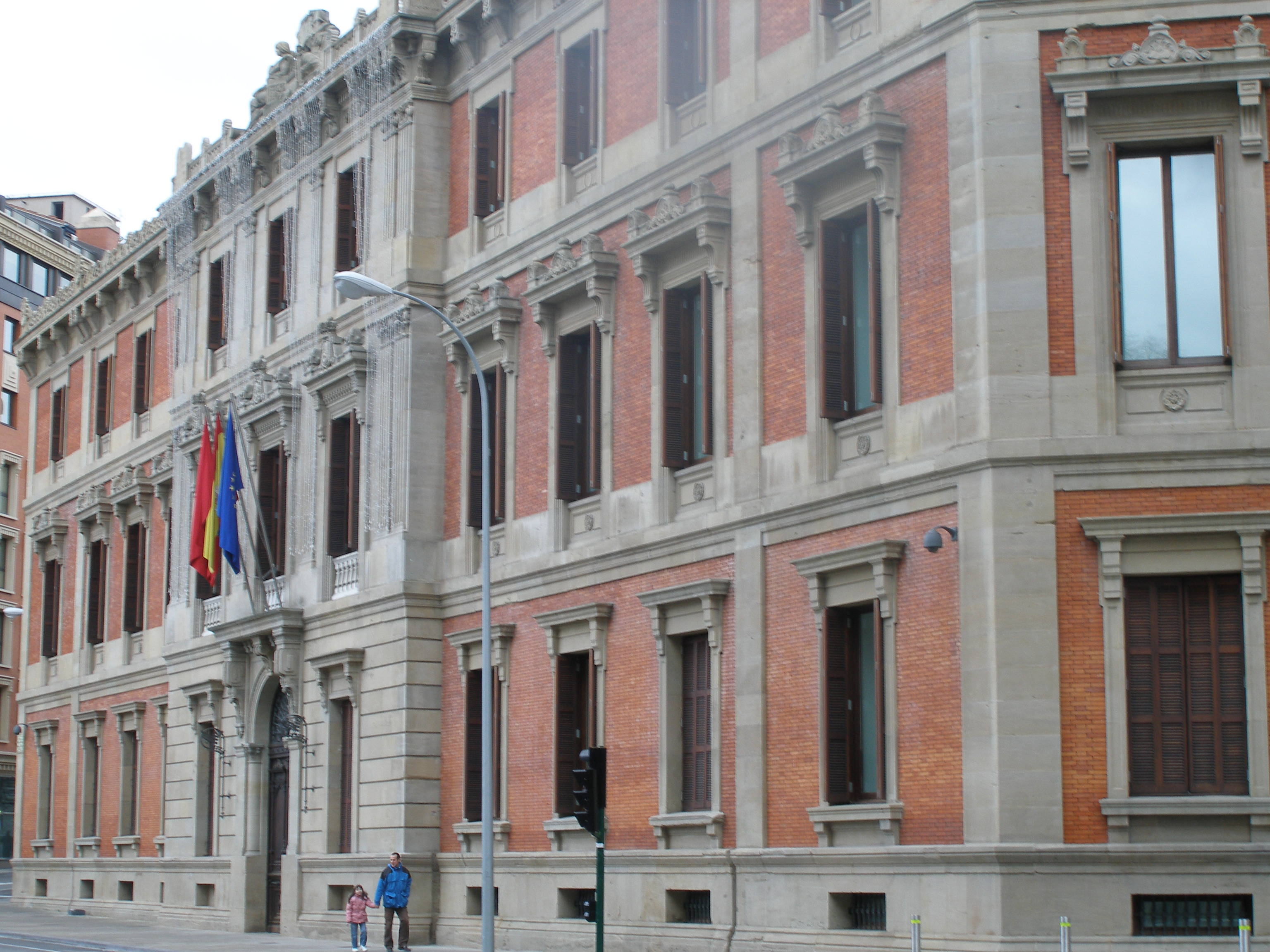 Nafarroako Parlamentua Iruñan